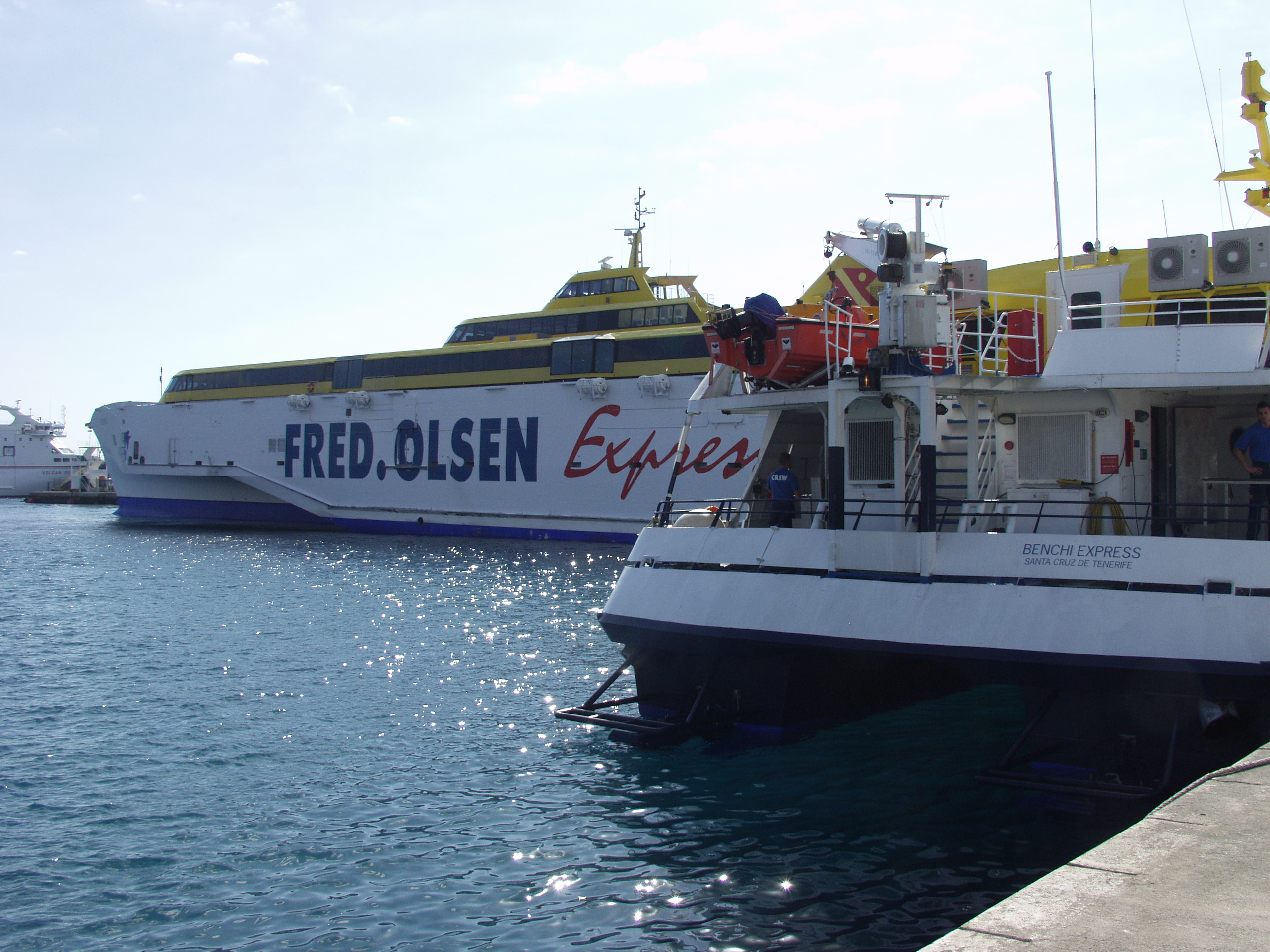 'Benchijigua Express' und 'Benchi Express' im Hafen von Los Christianos